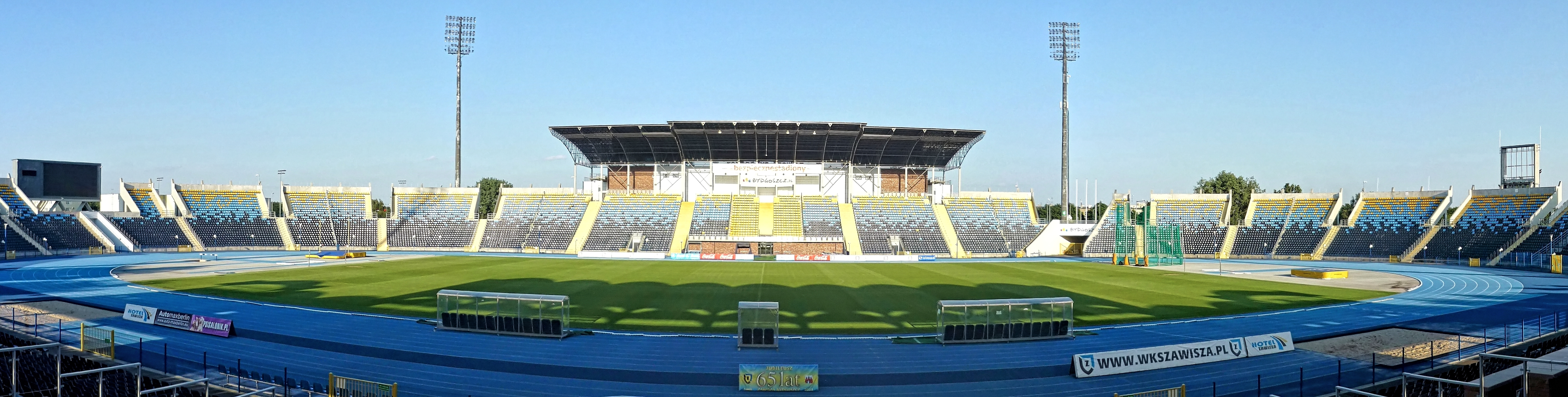 Stadion im. Zdzisława Krzyszkowiaka w Bydgoszczy - panorama.